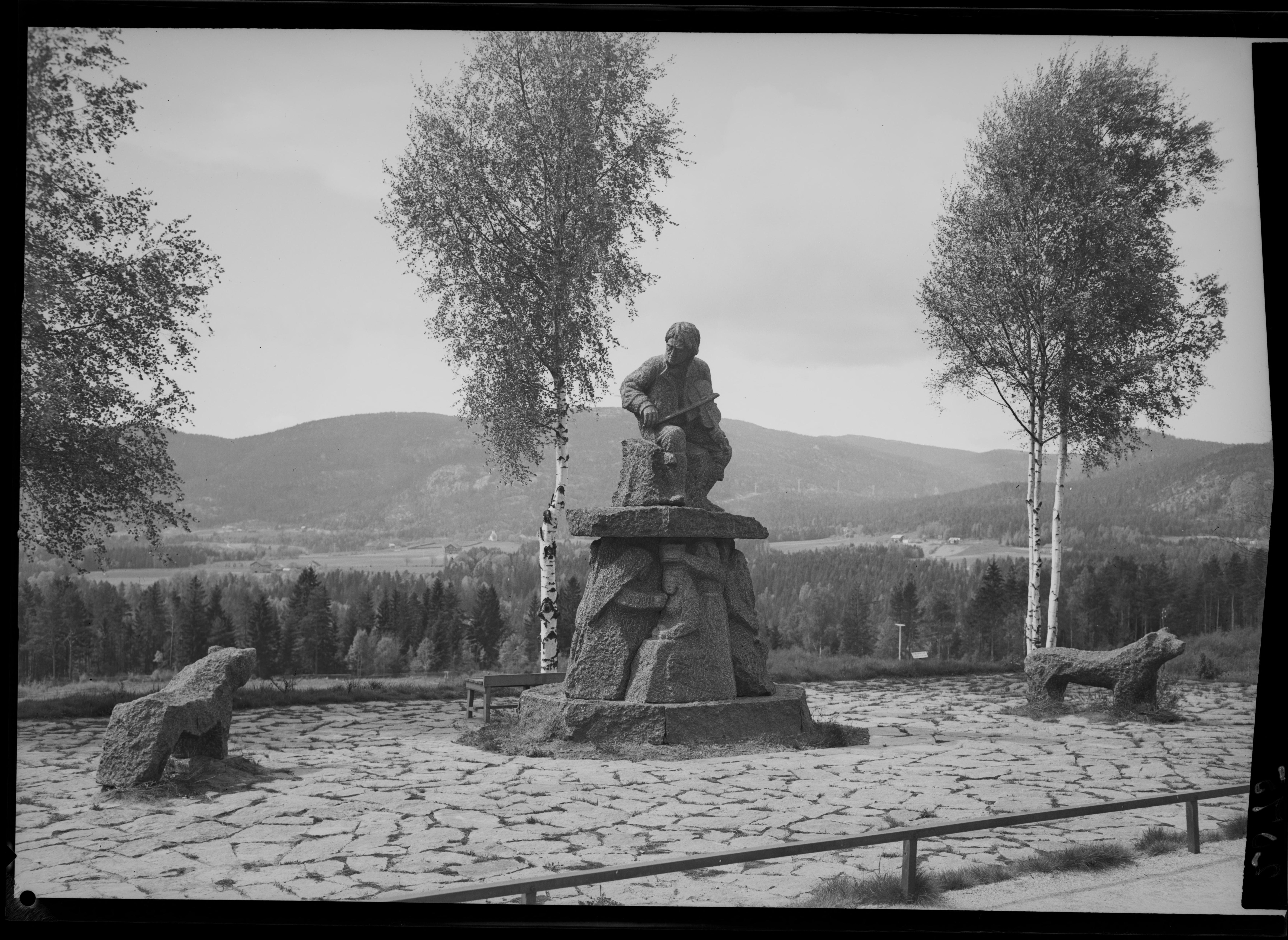 Bildet er hentet fra Nasjonalbibliotekets bildesamling. Anmerkninger til bildet var: Fotograf:Ukjent Nordagutu, Sauherad, Telemark